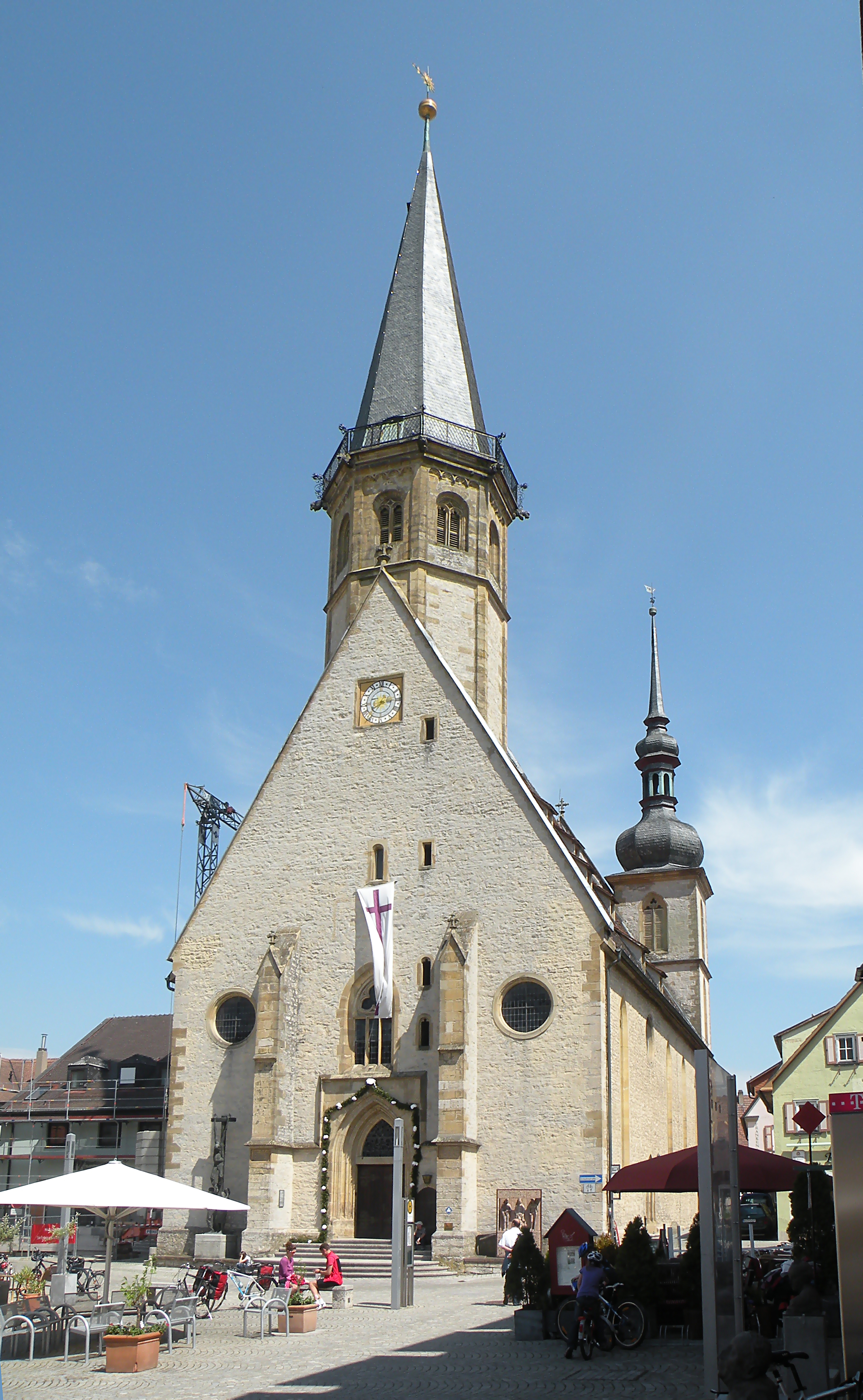 Weikersheim.St.George church. JPG